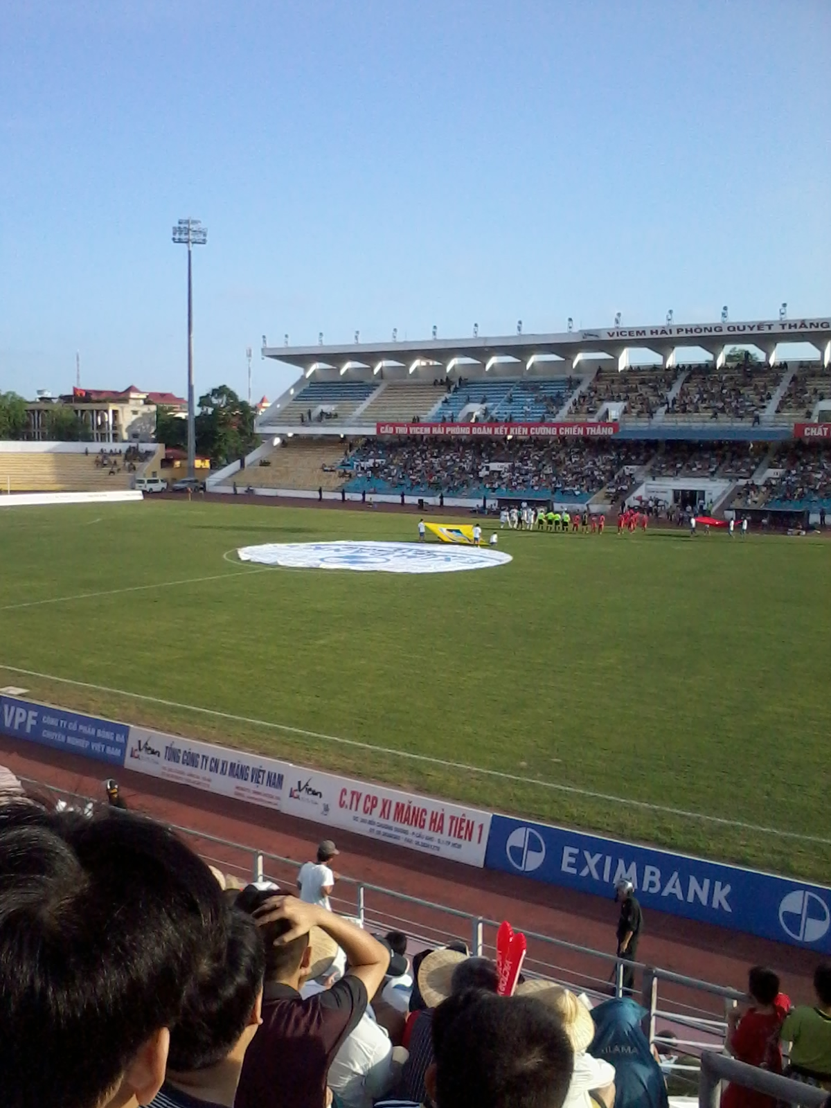 Lach Tray Stadium